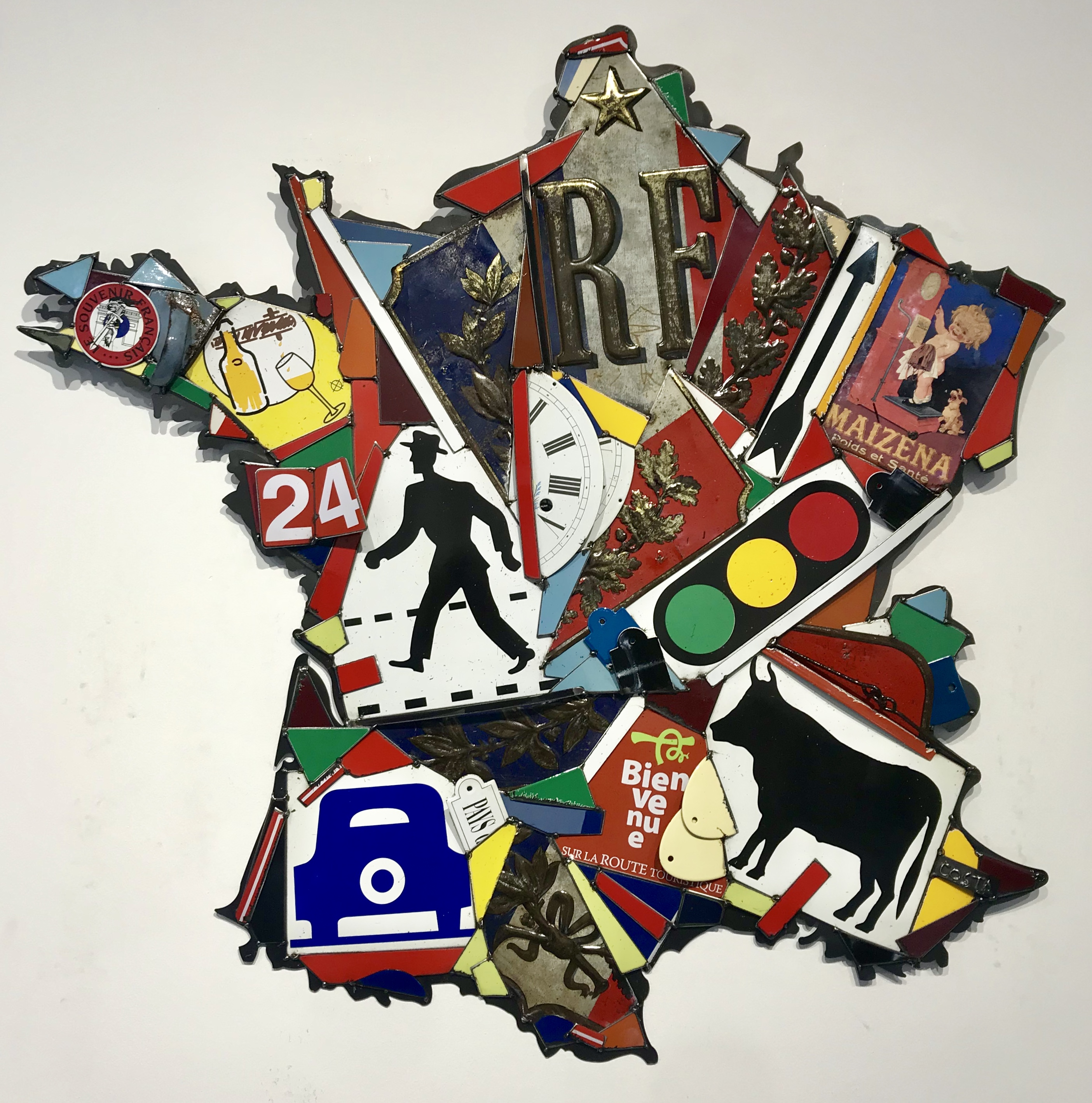 2019 - Tableau sur plaque de fer, réalisé à partir de fragments de panneaux de signalisation et autres, découpés réassemblés et soudés. Hauteur 100 cm